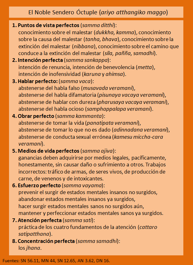 El Noble Sendero Óctuple enseñado por el Buddha.